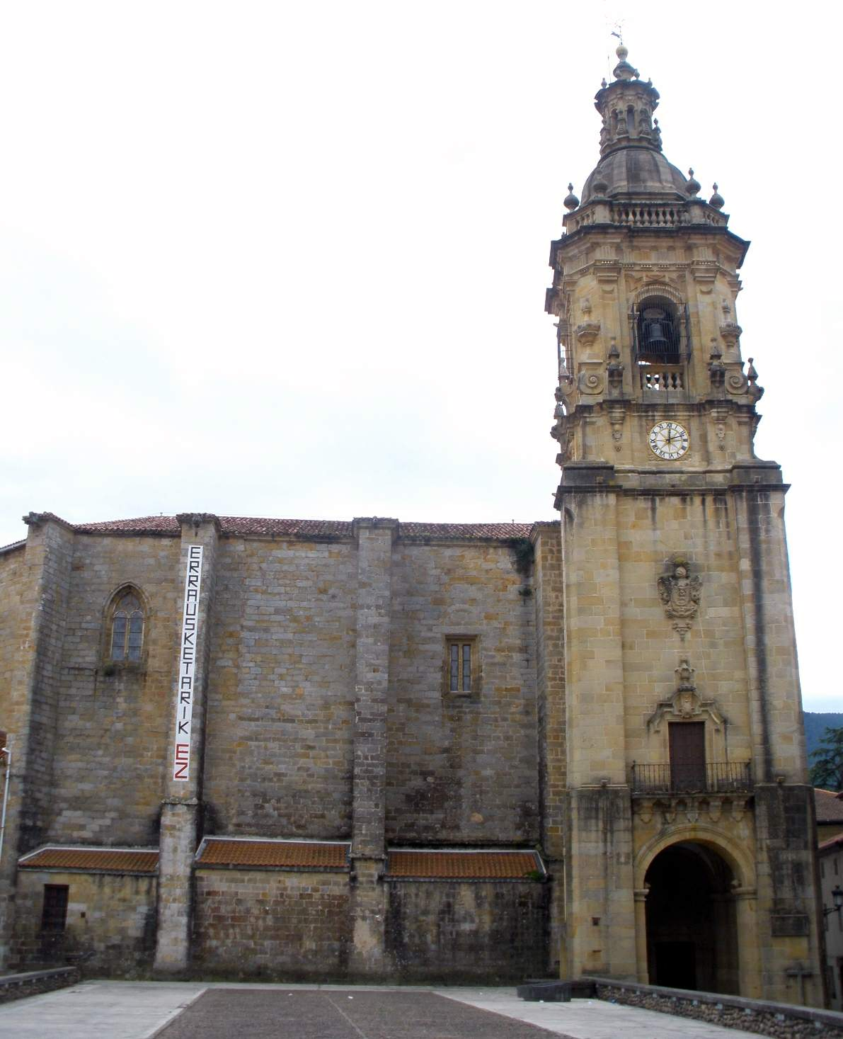 Church of San Salvador, Usurbil (Gipuzkoa, Basque Country, Spain)